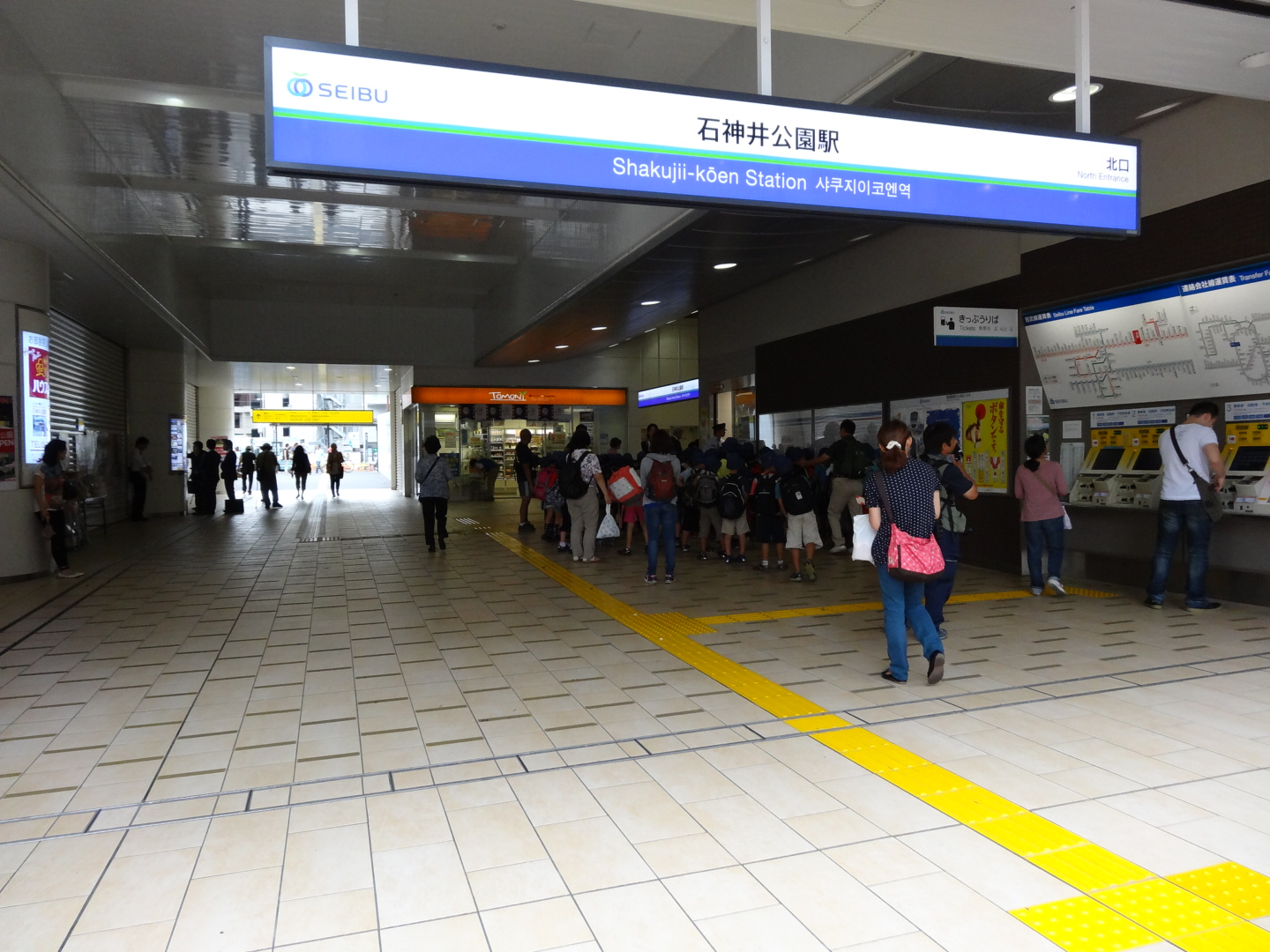 Syakujii-koen-station-eastexit 2013/10/10